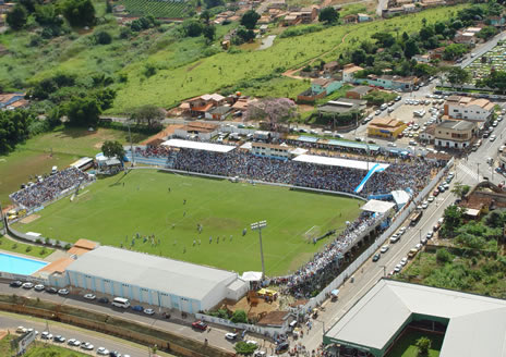 O estádio Genervino da Fonseca, onde o CRAC de Catalão (Goiás), clube da terceira divisão do campeonato brasileiro de futebol, manda seus jogos.